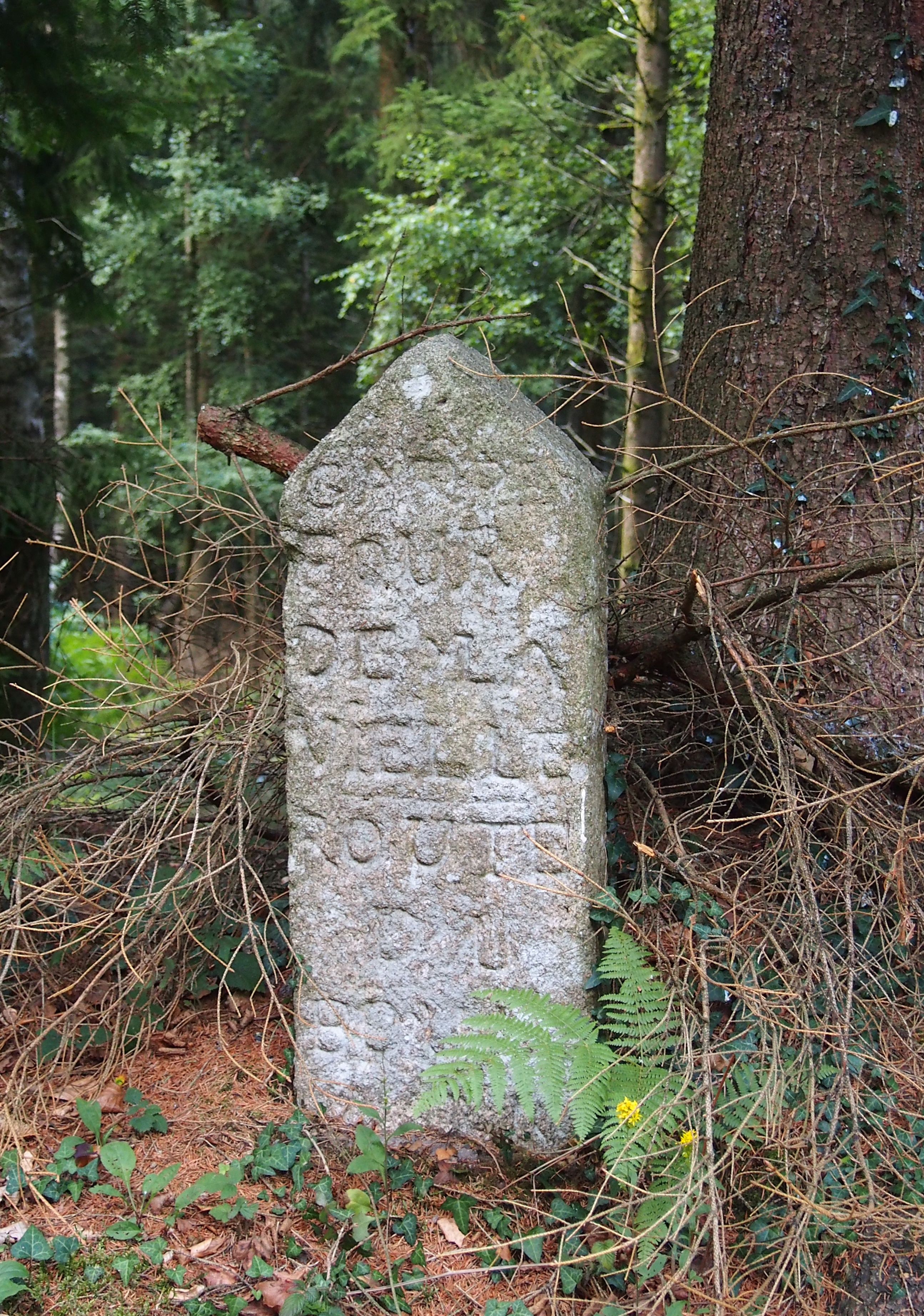 Le Bouillon (Normandie, France). Une des bornes de la forêt d'Écouves classées Monuments historiques, au carrefour de la Vielle, sur la route forestière de la Vielle.